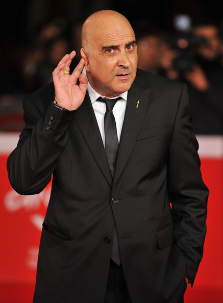 Rocco Mortelliti alla presentazione del film " La scomparsa di patò"